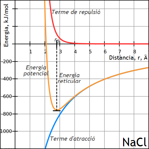 Gràfic on es representa l'energia potencial corresponent a l'enllaç iònic del clorur de sodi, NaCl